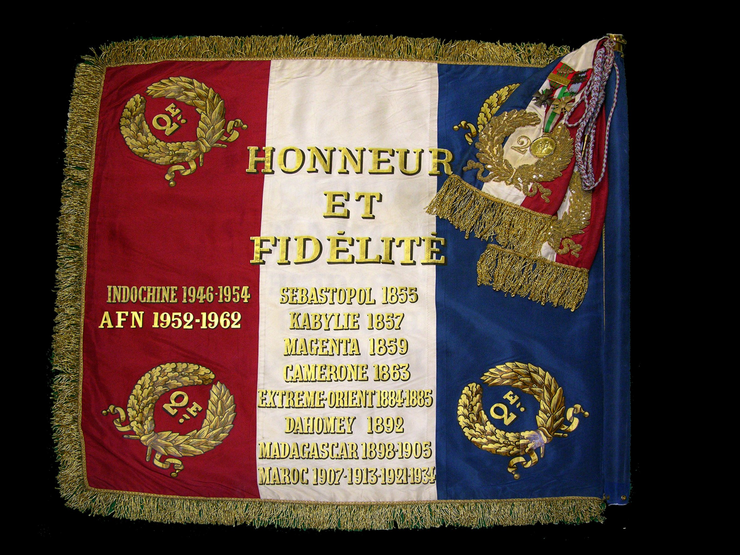 Drapeau du 2e Régiment étranger d'infanterie (Nîmes, France) verso